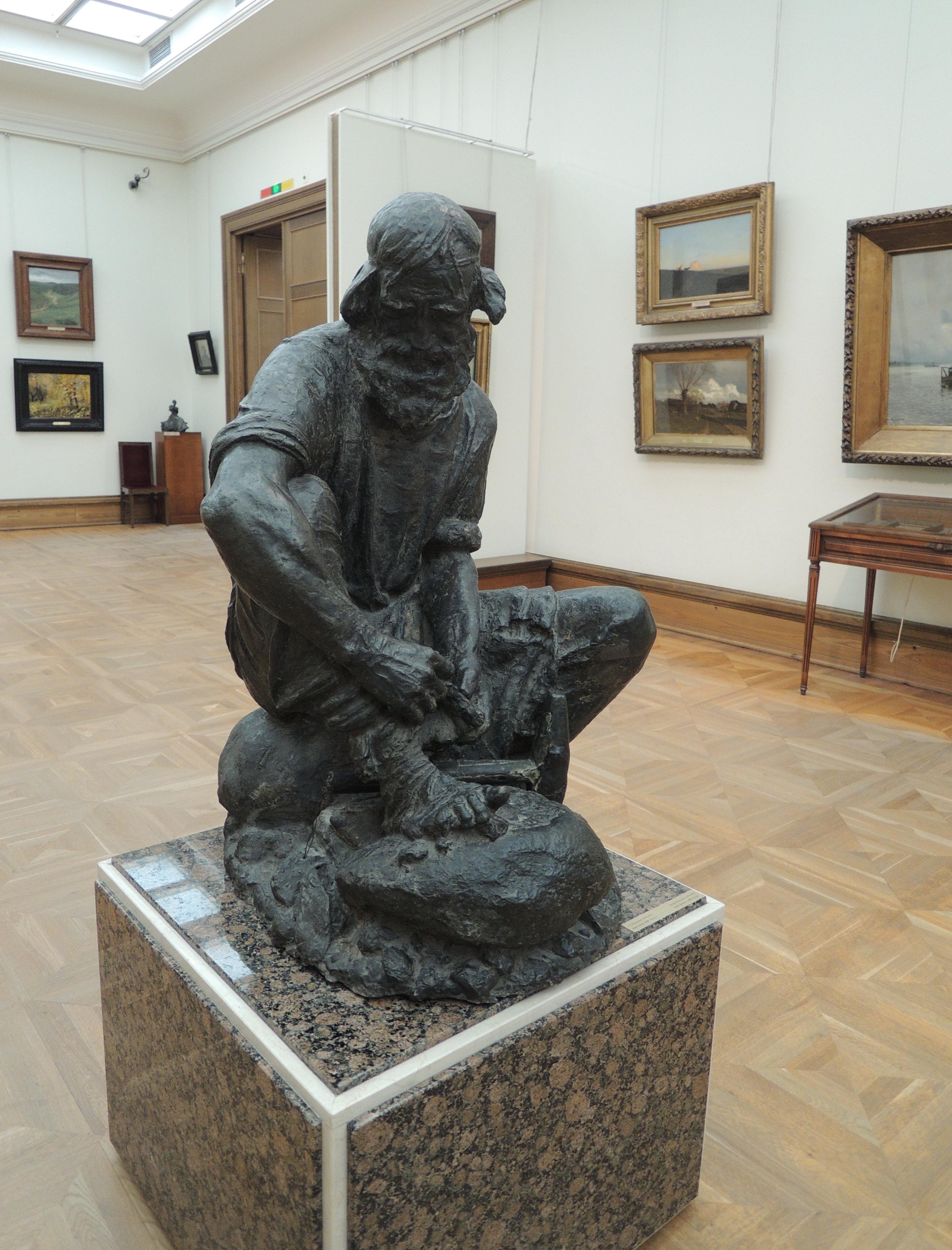 Коненков С.Т. (1874-1971). "Камнебоец". 1898. ГТГ. Бронза.